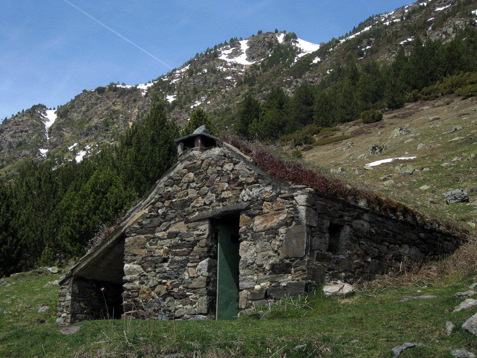 Pleta de Castellà, Arcalis, Andorra